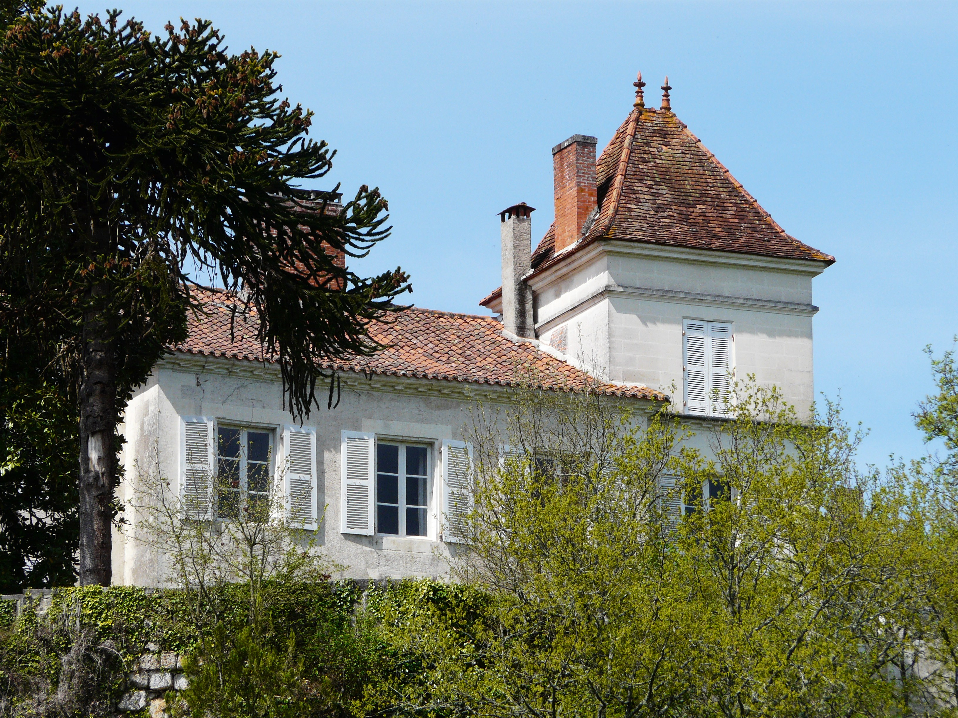 La partie nord de la façade est du château de la Barde, Creyssac, Dordogne, France.